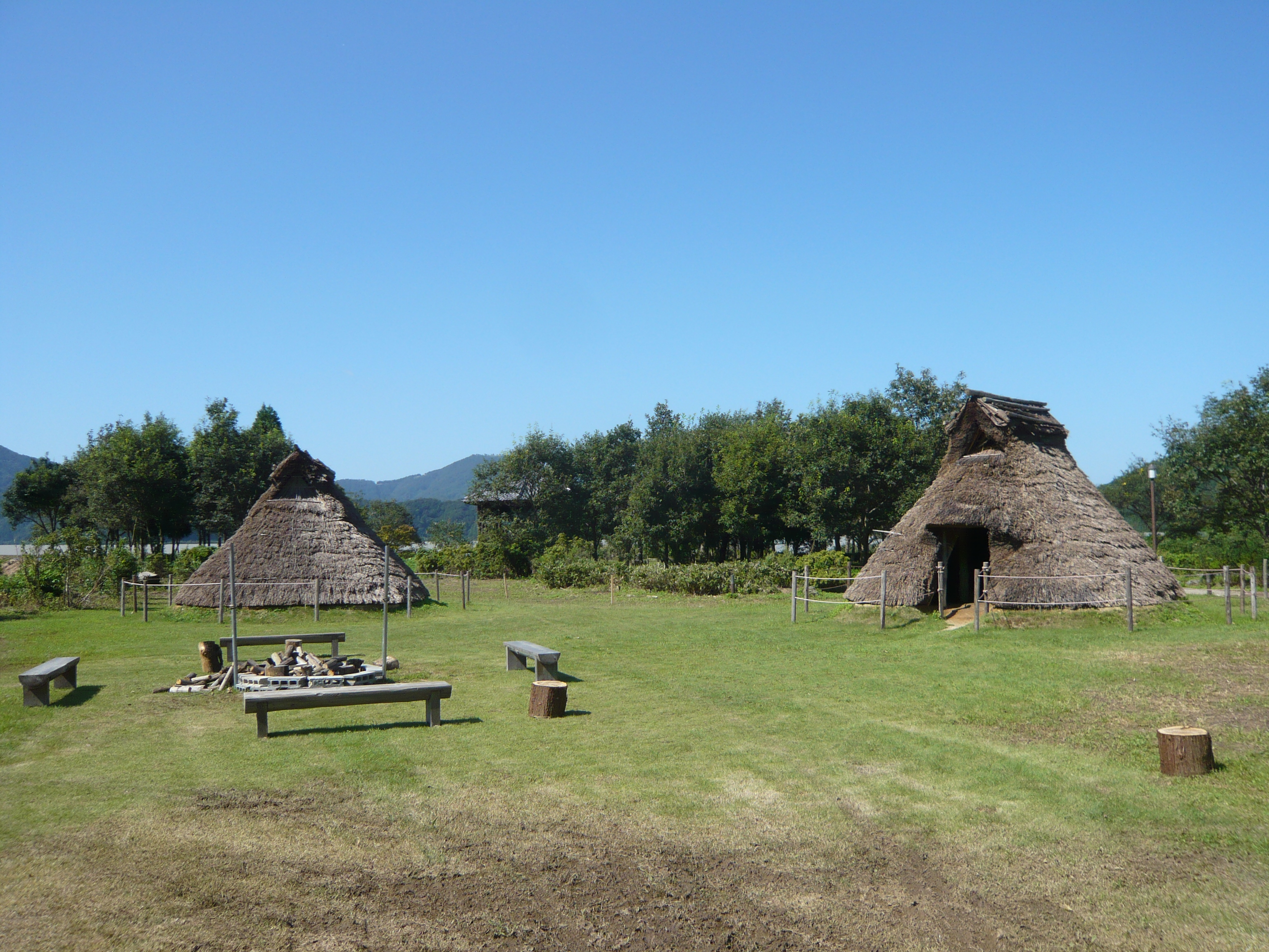 鳥浜貝塚の復元竪穴式住居